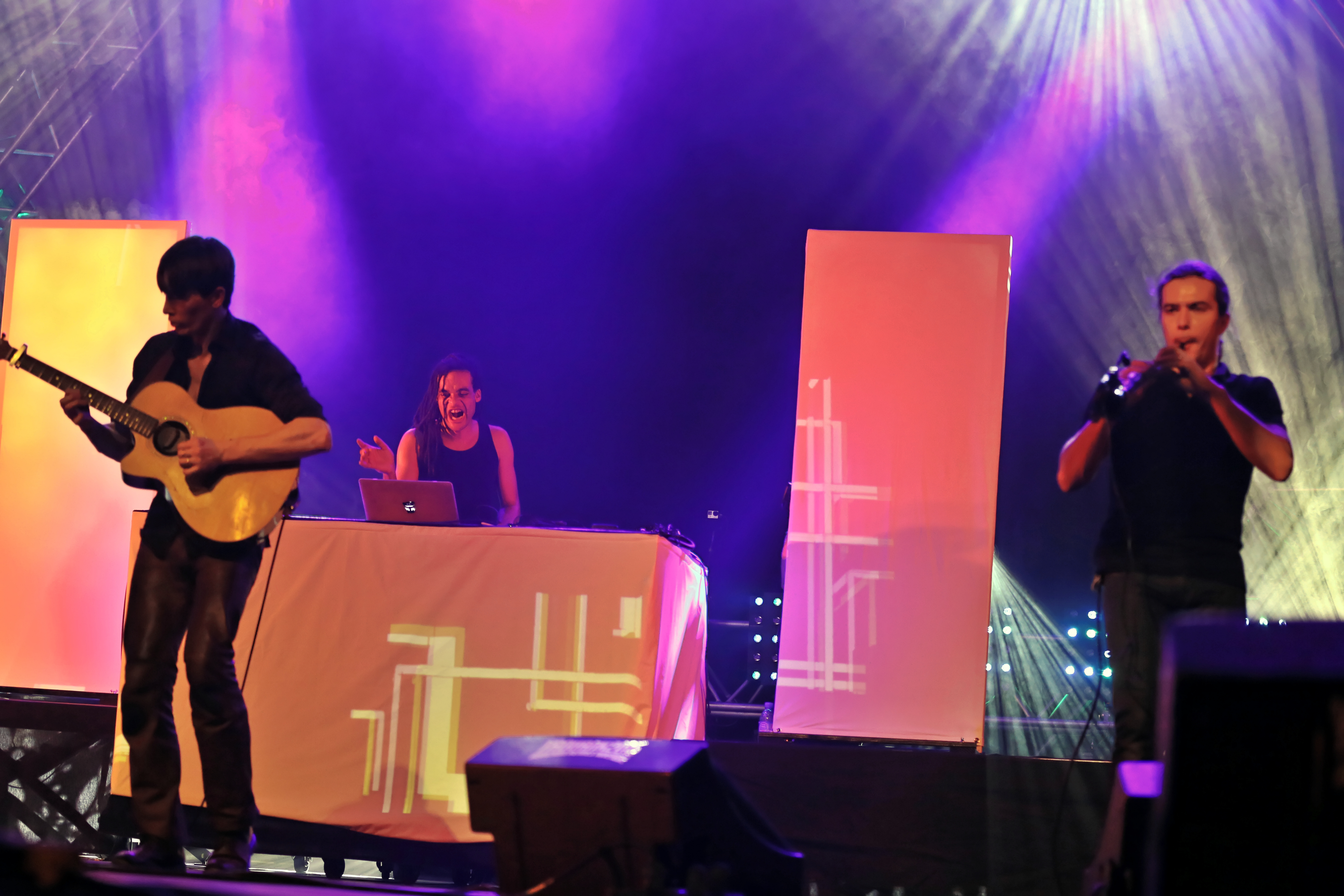 Plantec en fest-noz lors du festival Yaouank le 21 novembre 2015 au Parc des Expositions de Rennes.